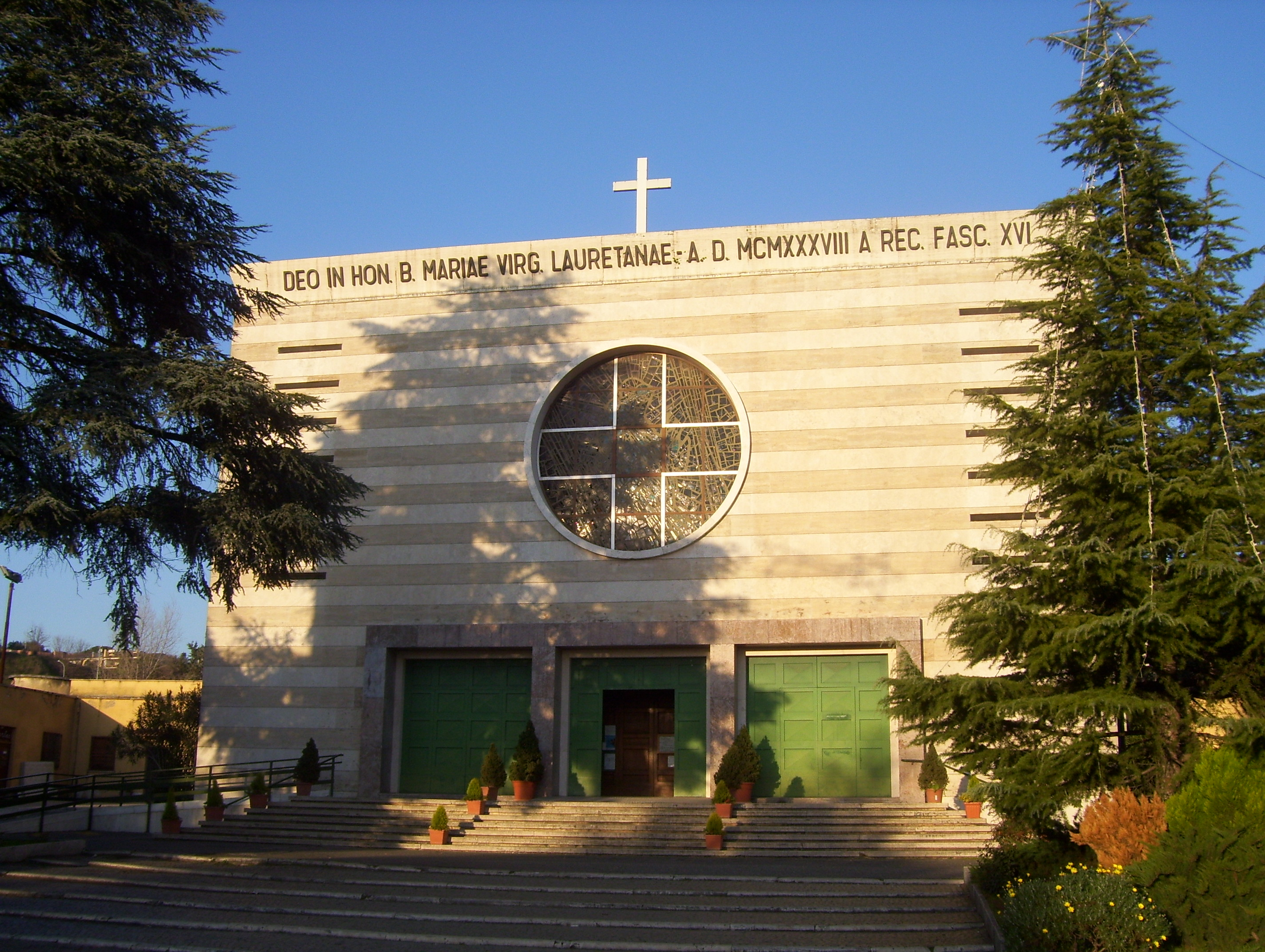 Chiesa di Santa Maria di Loreto, a Guidonia Montecelio (provincia di Roma).